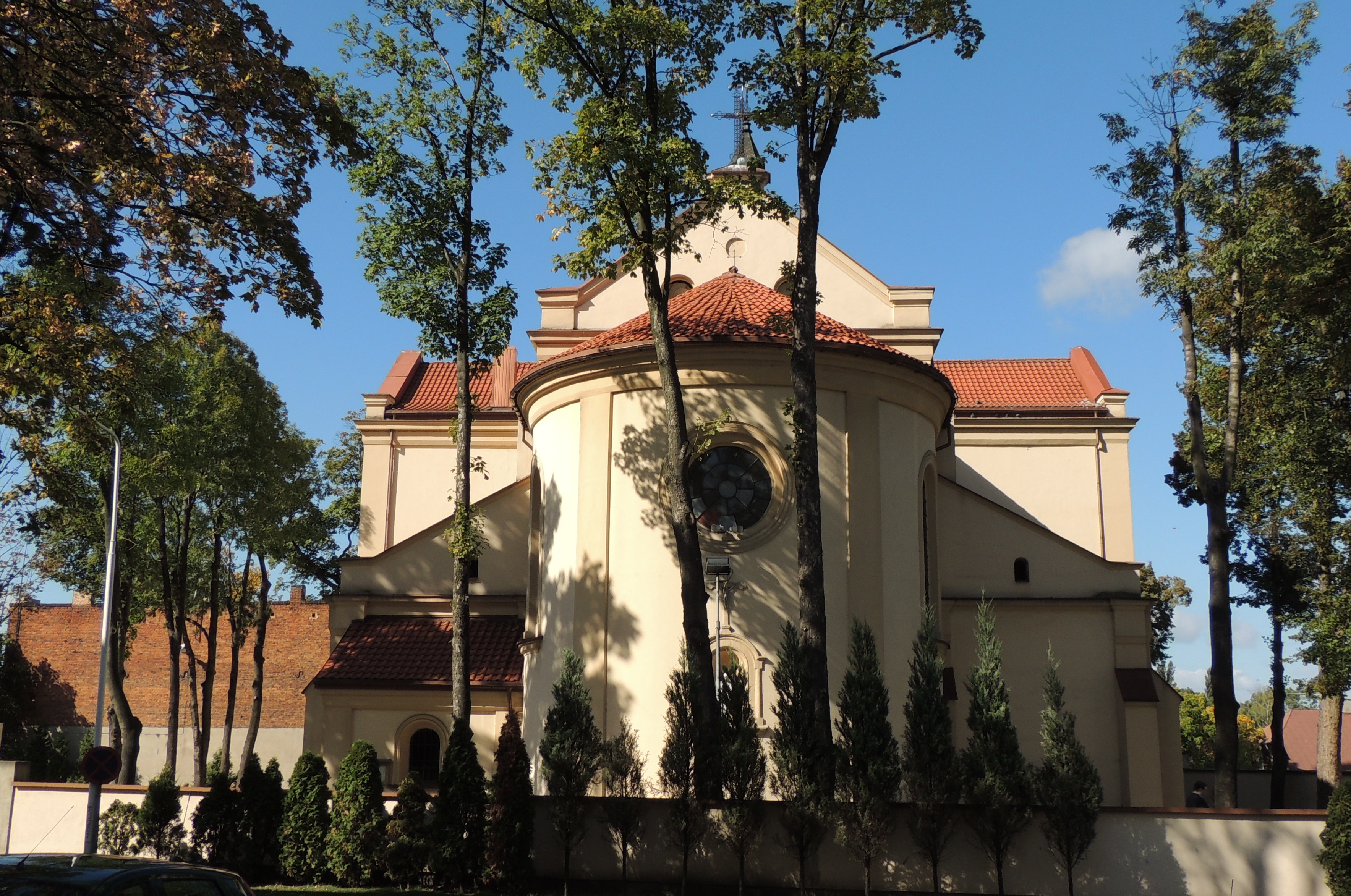 Bazylika Wniebowzięcia Najświętszej Maryi Panny i Sanktuarium Św. Maksymiliana w Zduńskiej Woli